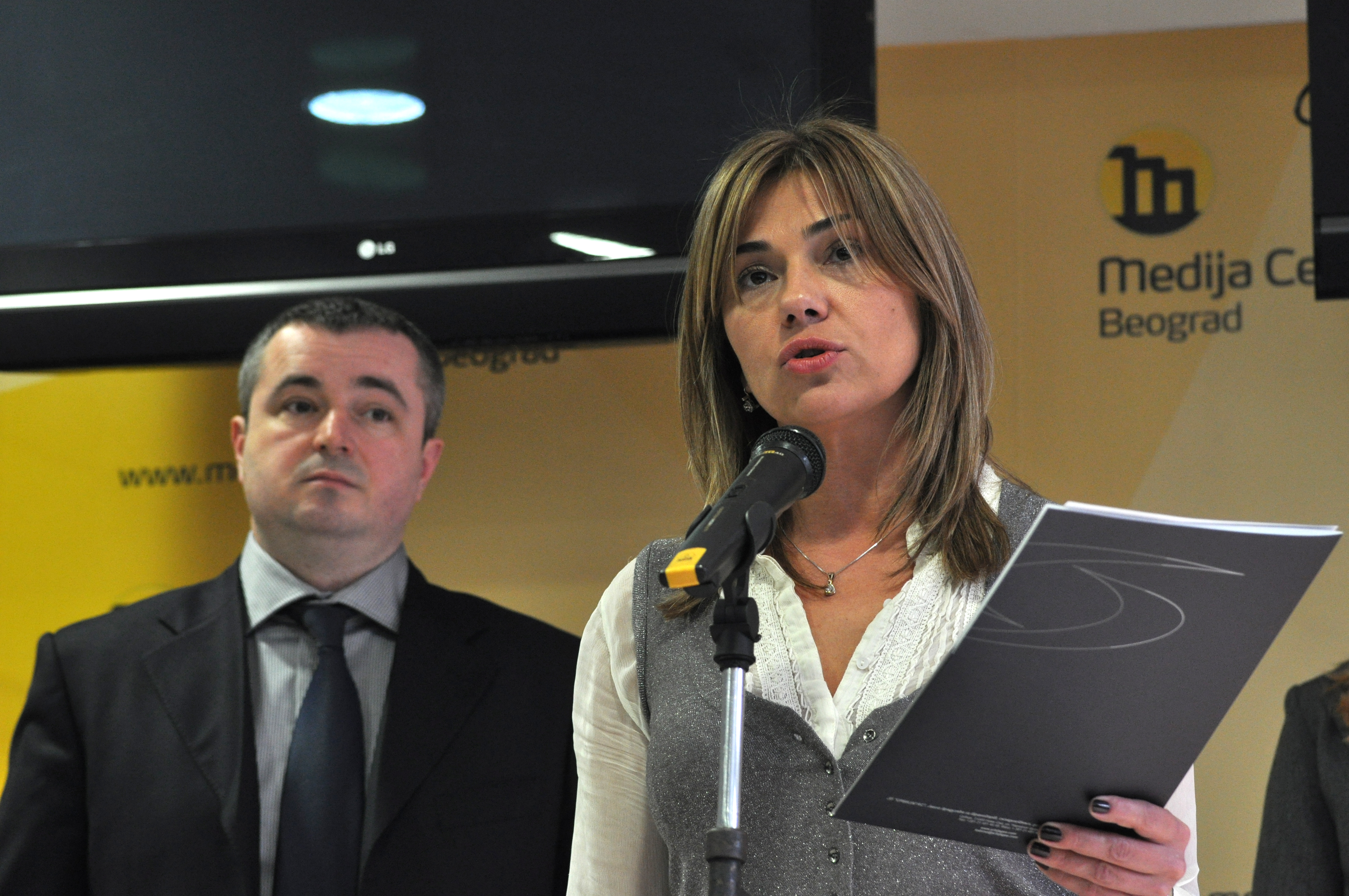 Бранка Невистић